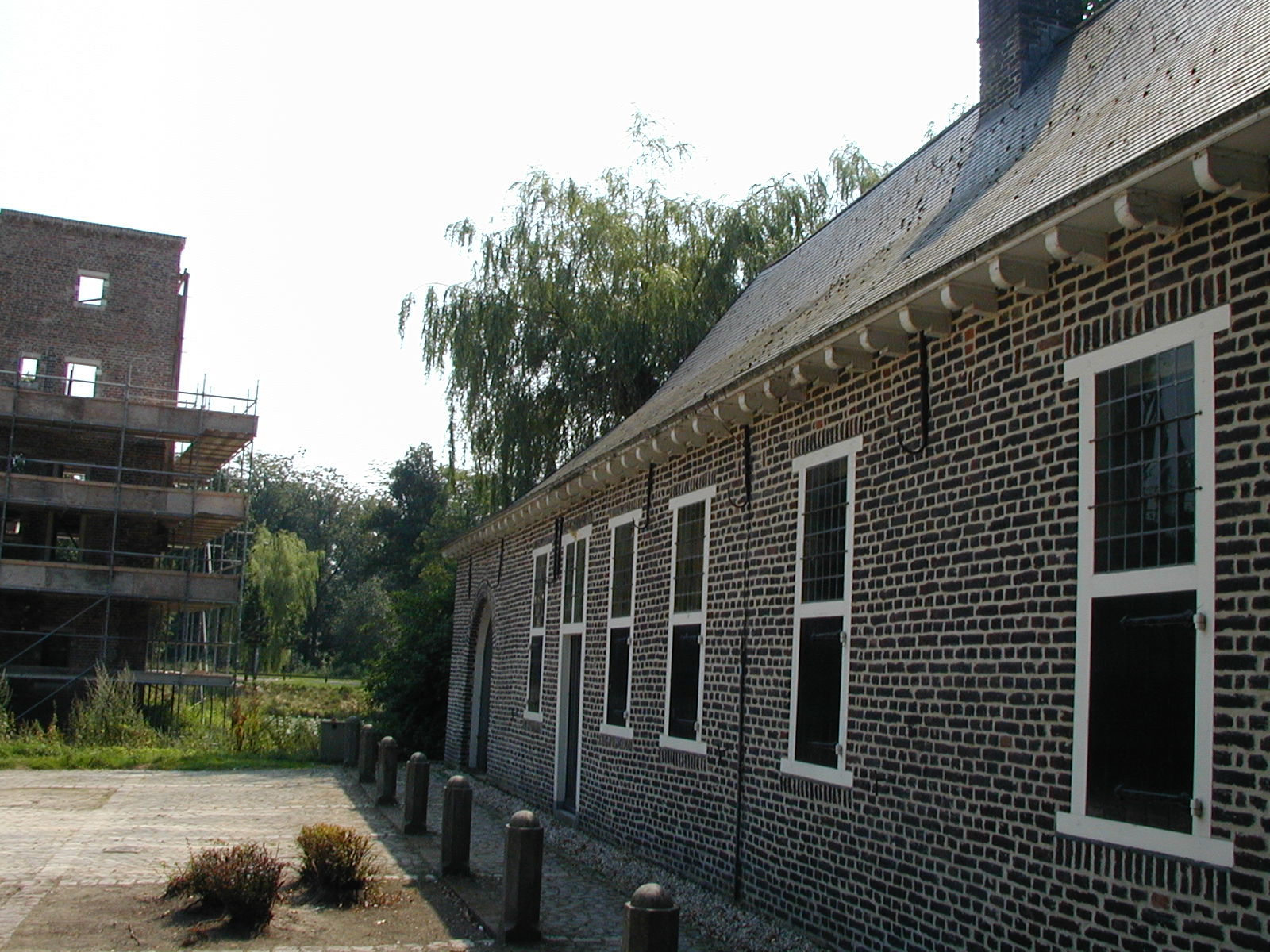 Schuin zicht op het Dinghuis en het Groot Kasteel te Deurne, 31 juli 2002. Foto zelf gemaakt.